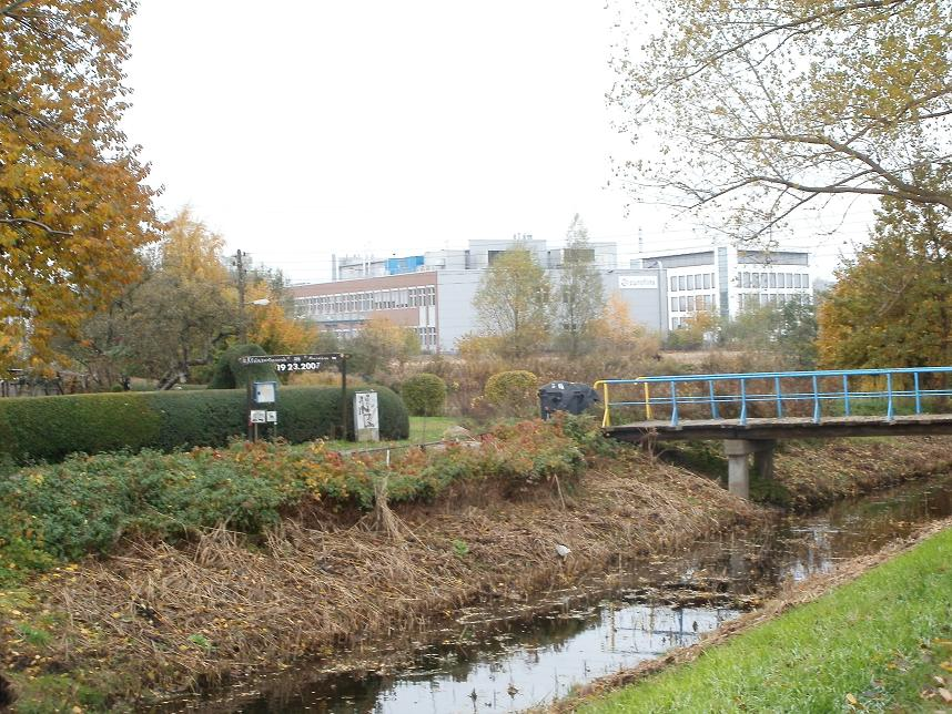 Bild von Hamburg-Neuland mit typischer Kombination von Kleingärten, Natur, Wasserläufen und Gewerbe.